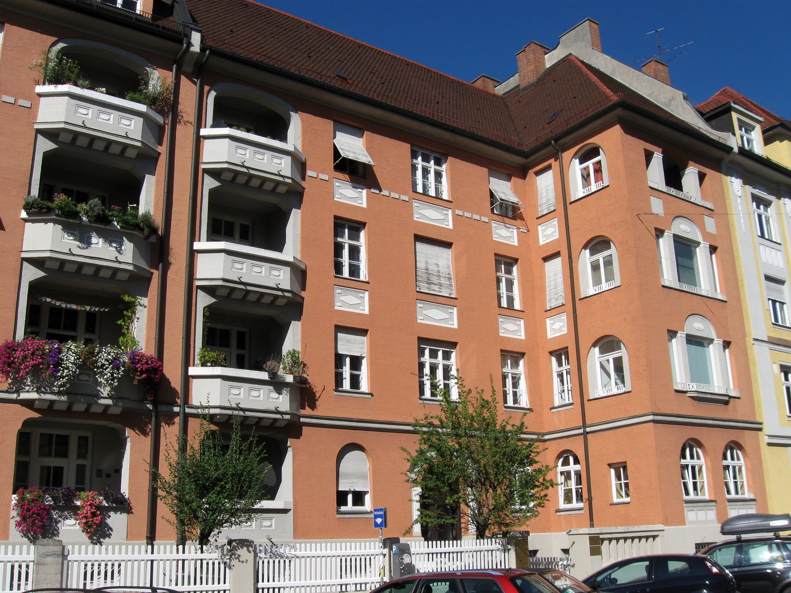 Clemensstraße 32; Clemensstraße 34. Mietshausblock, viergeschossiger Jugendstilbau mit eingezogener Mitte, Loggien und Putzdekor, Westtrakt mit Mansardwalmdach und Dachhaus, Anfang 20. Jh.